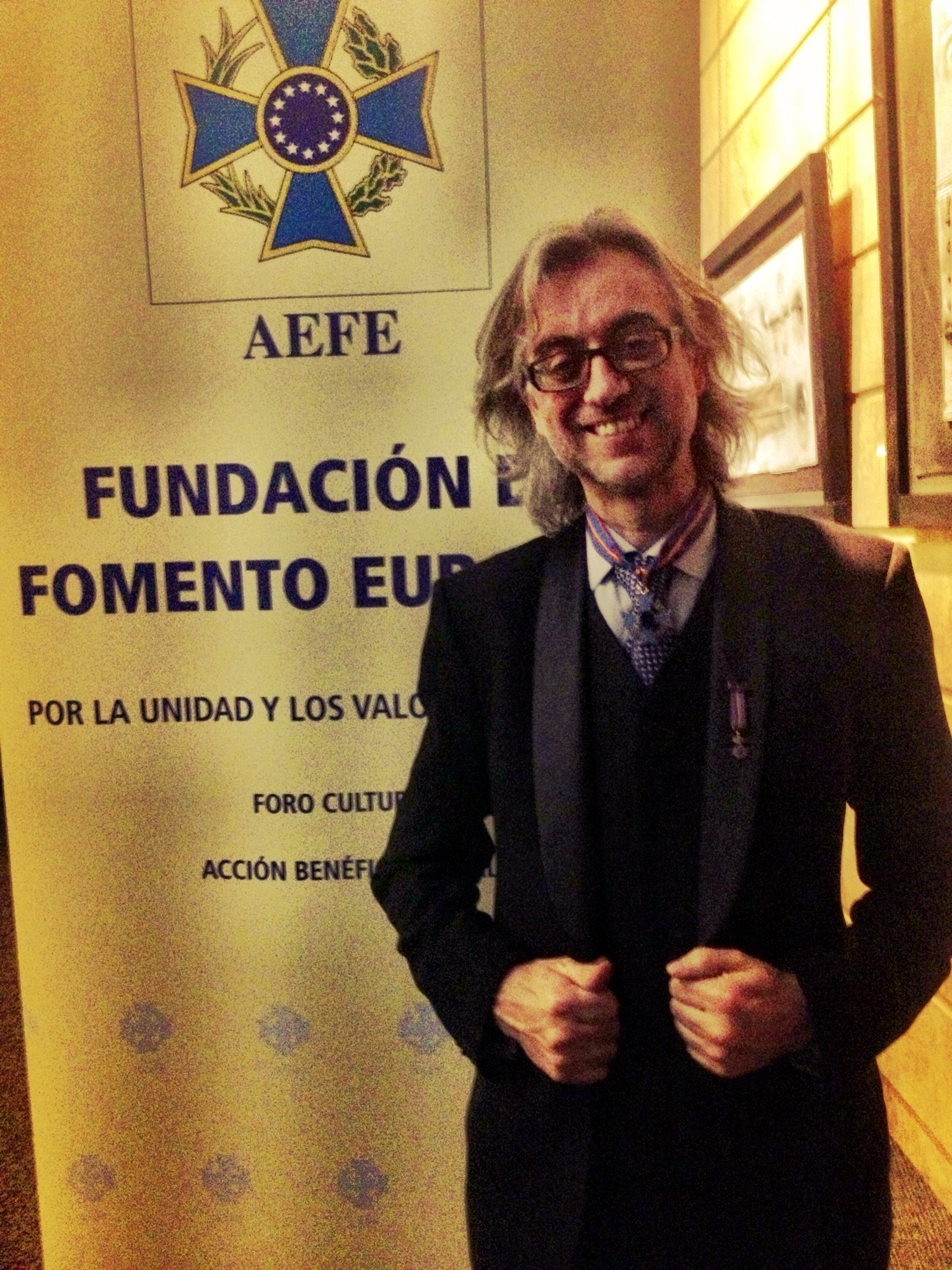 Víctor Amela, premiado con la Gran Cruz de Oto de la AEFE